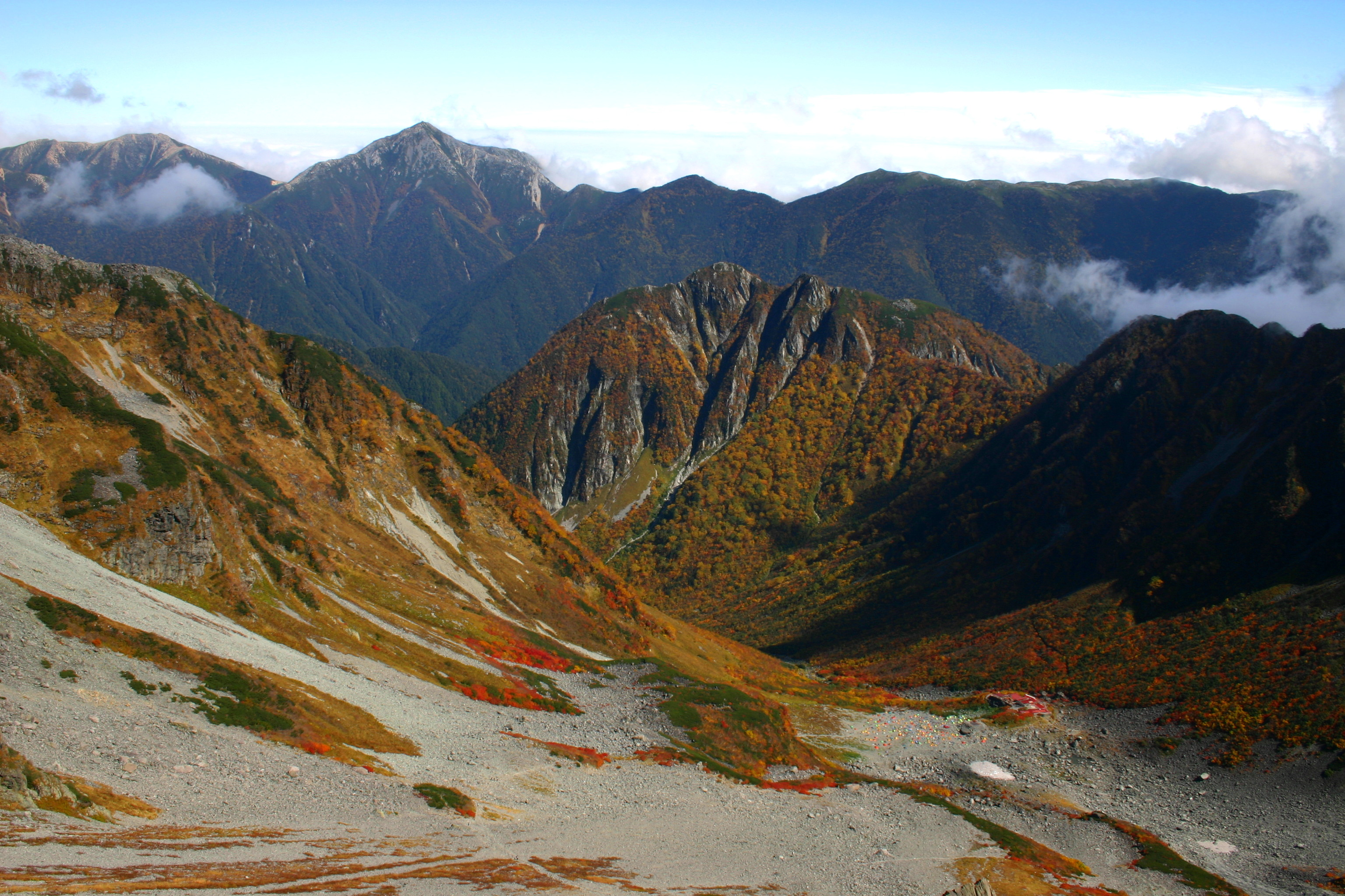 涸沢より常念